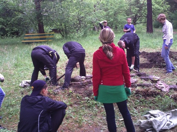 Волонтёрский лагерь «Доброград на Ангаре 2010».